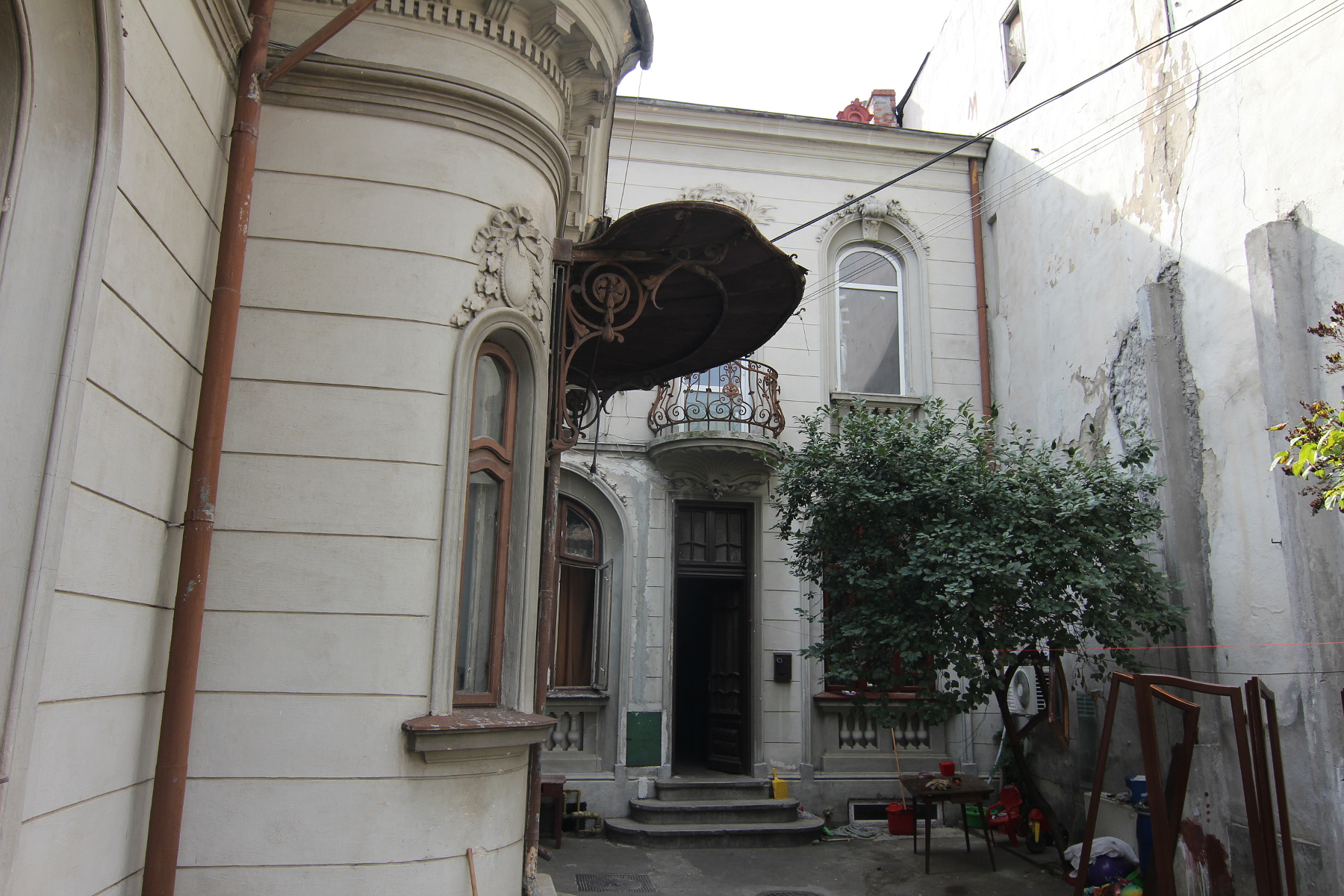 Casă pe Stelea Spătarul